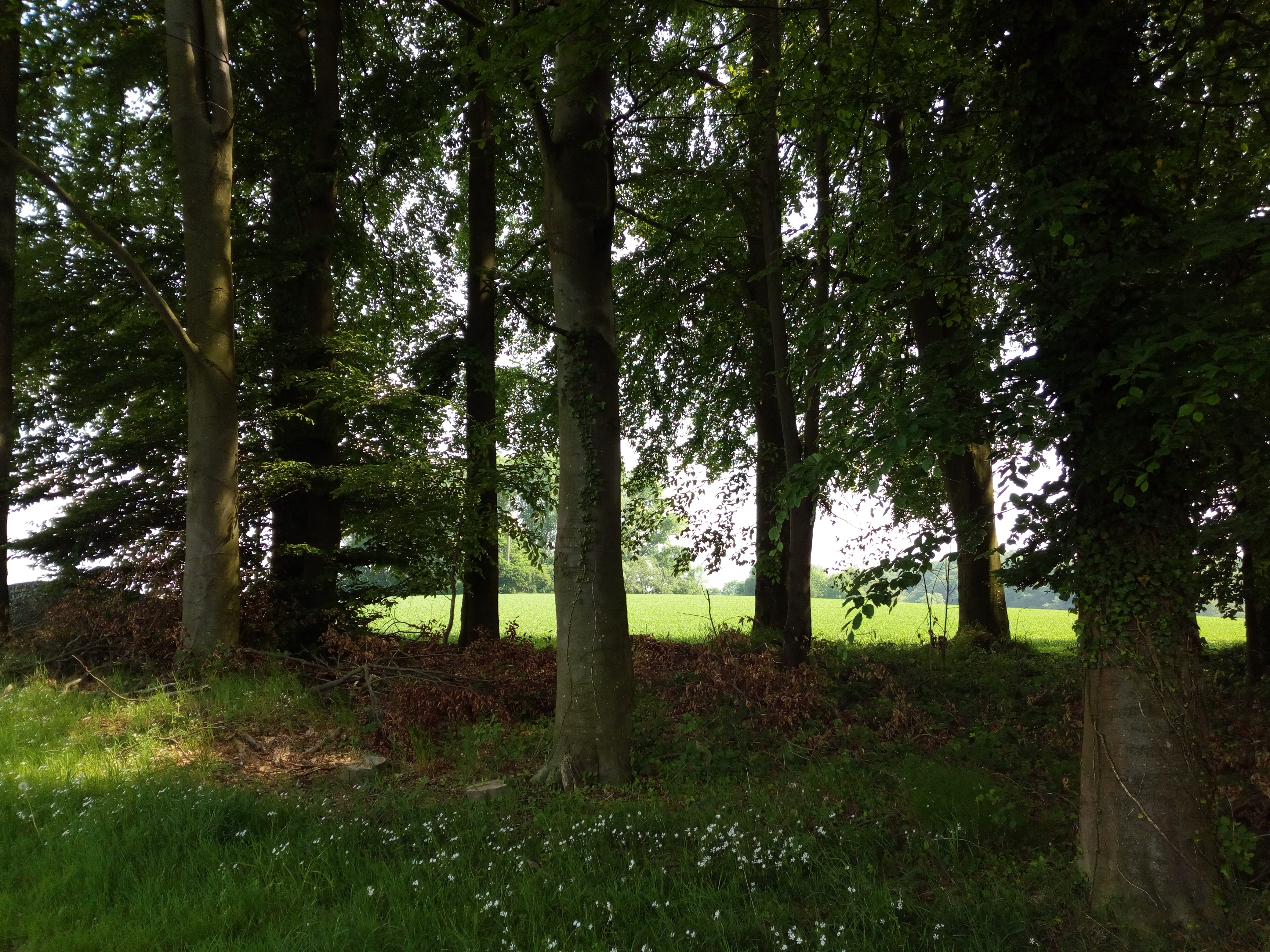 Angrenzend an Felder, ein kleines Waldschutzgebiet in Melle-Tittingdorf.